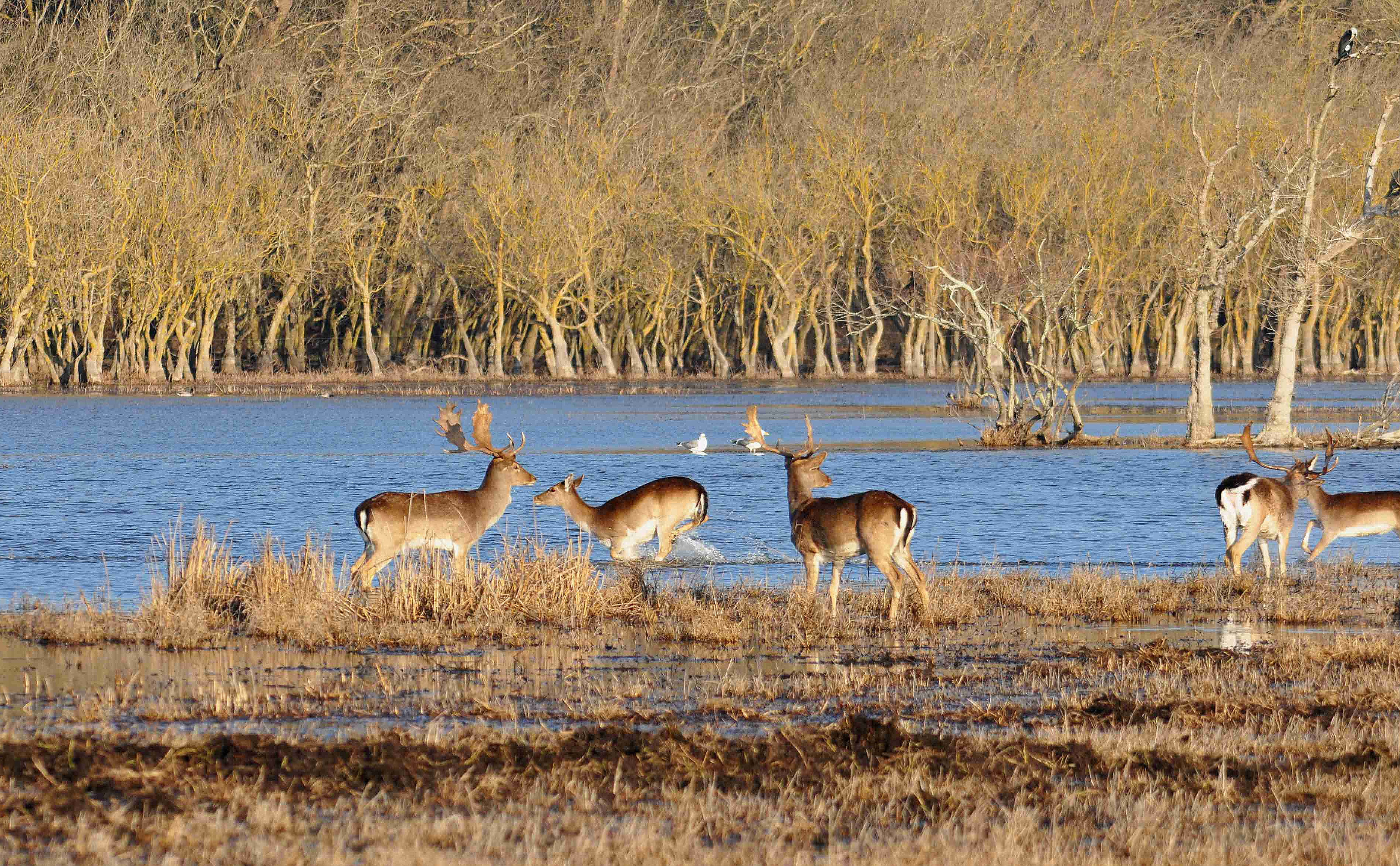 Padule di Bolgheri "marchese Mario Incisa della Rocchetta" This is a photo of a monument which is part of cultural heritage of Italy. The authorisation for taking photos of this object was provided by the World Wide Fund for Nature Italy.